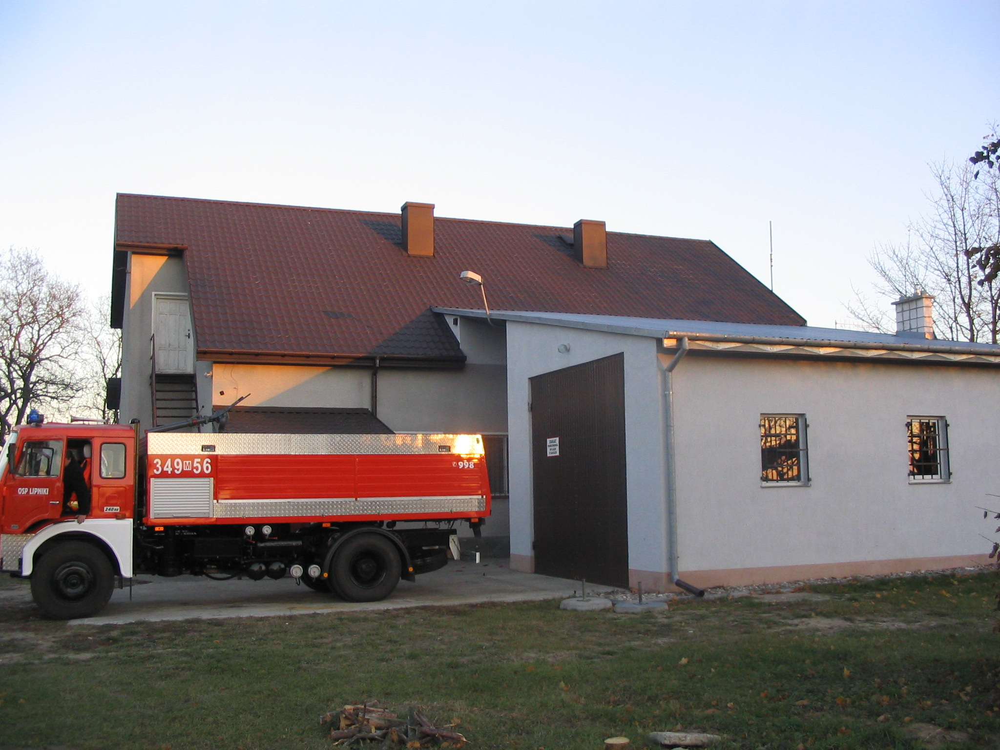 Remiza (widok na garaż) i samochód bojowy Jelcz Ochotniczej Straży Pożarnej w Lipnikach.